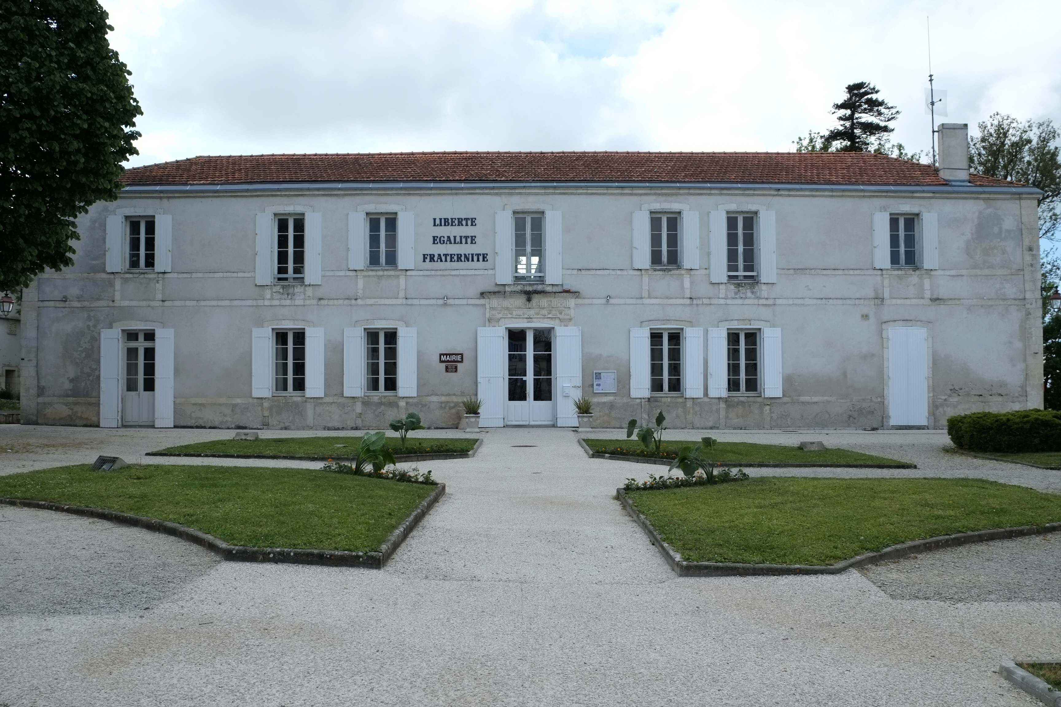 Mairie L'Houmeau Charente-Maritime France